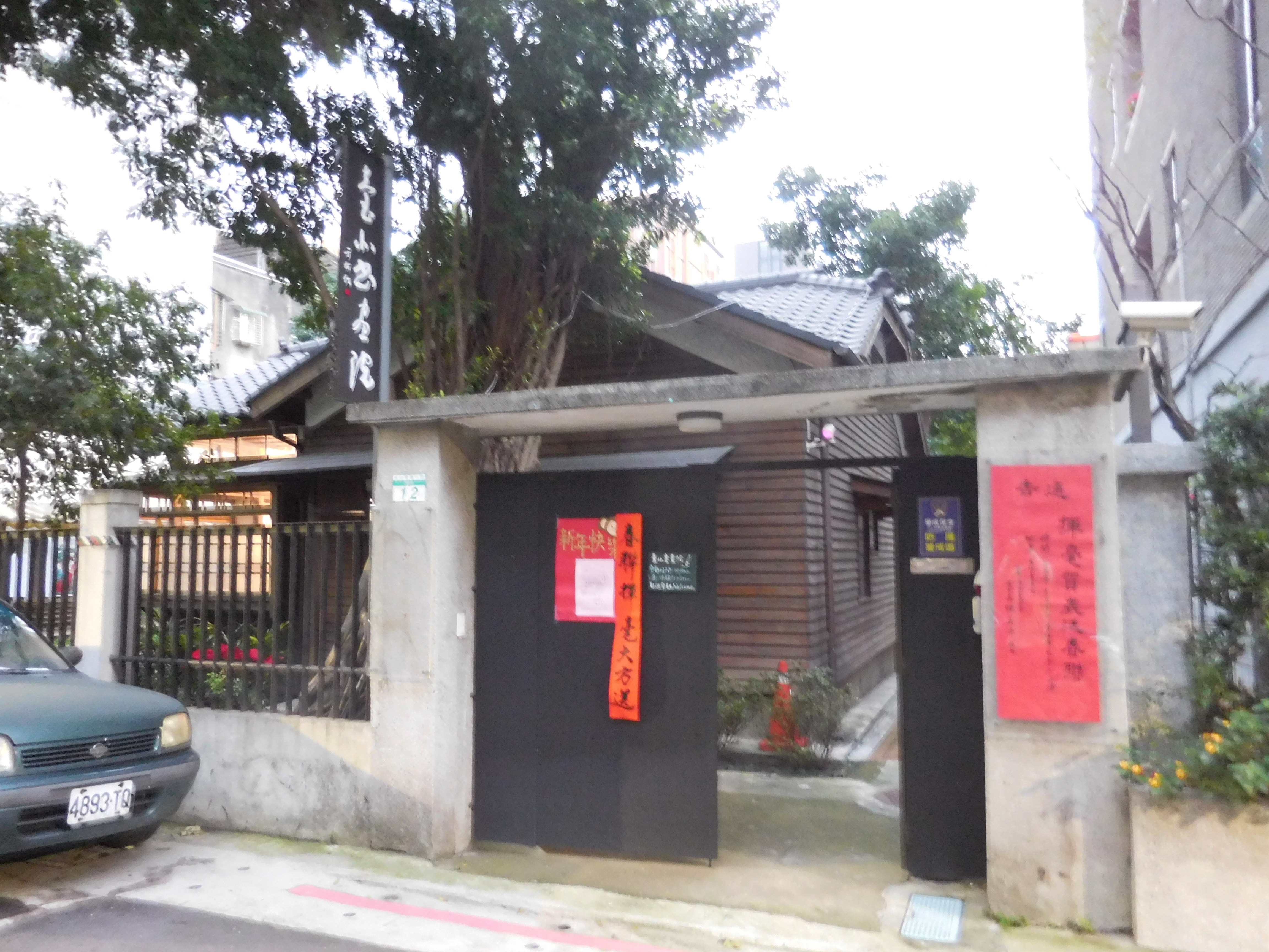 中正區金山南路一段30巷12號 This image (or all images in this category/page) is very small, unfixably too light/dark, or may not adequately illustrate the subject of the picture. If a higher-quality image is available please consider replacing this one; otherwise, a replacement under a free license should be found or provided. Please see Category:Image cleanup templates for templates used to mark images that only need a clean-up. For more help, see Commons:Media for cleanup#Low quality pictures.